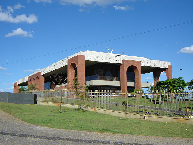 Palácio do Araguaia, sede do governo do Estado de Tocantins, Brasil. Camera: Sony DSC-P73 License on Flickr (2011-01-21): CC-BY-2.0